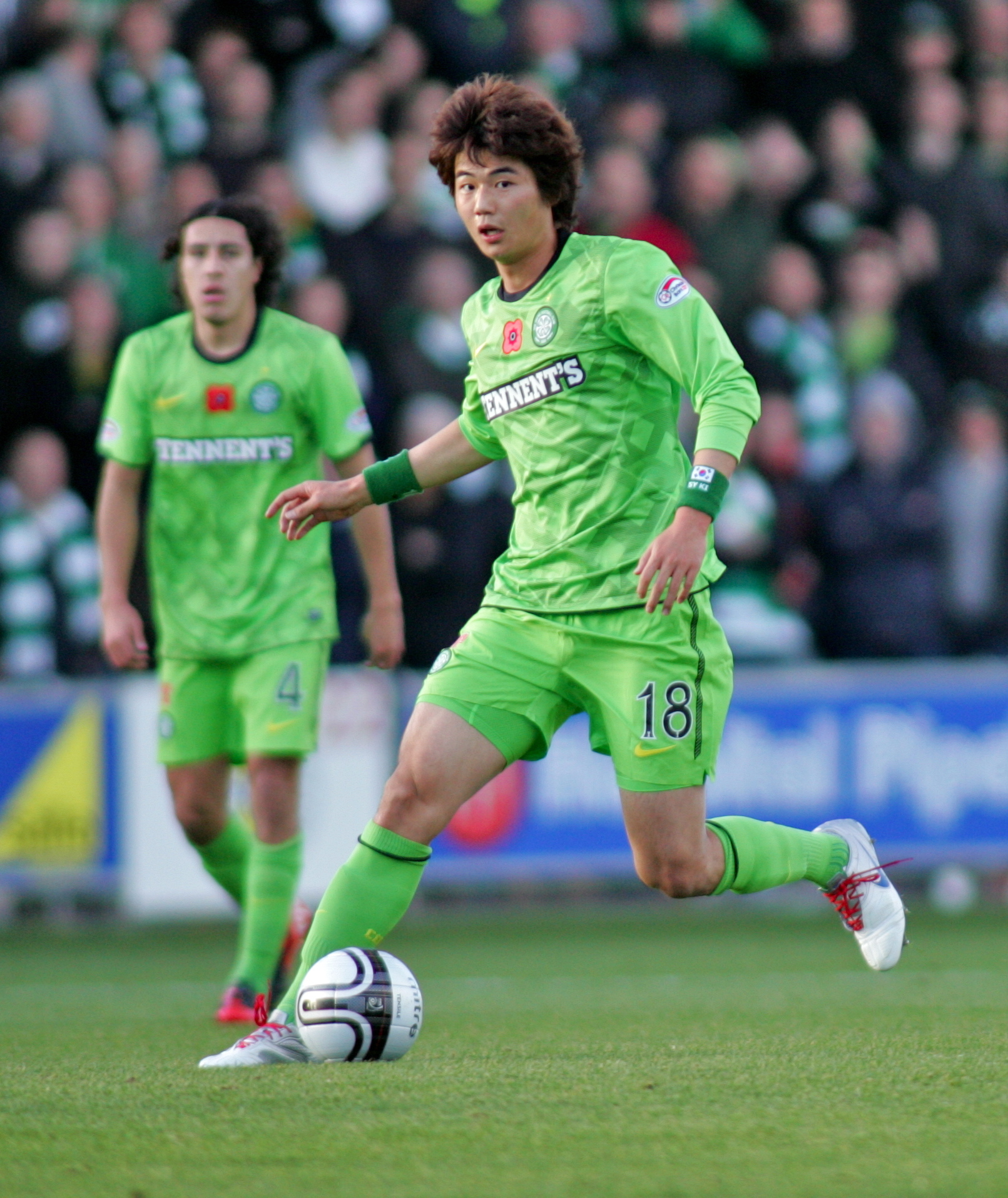 HI7Y0122